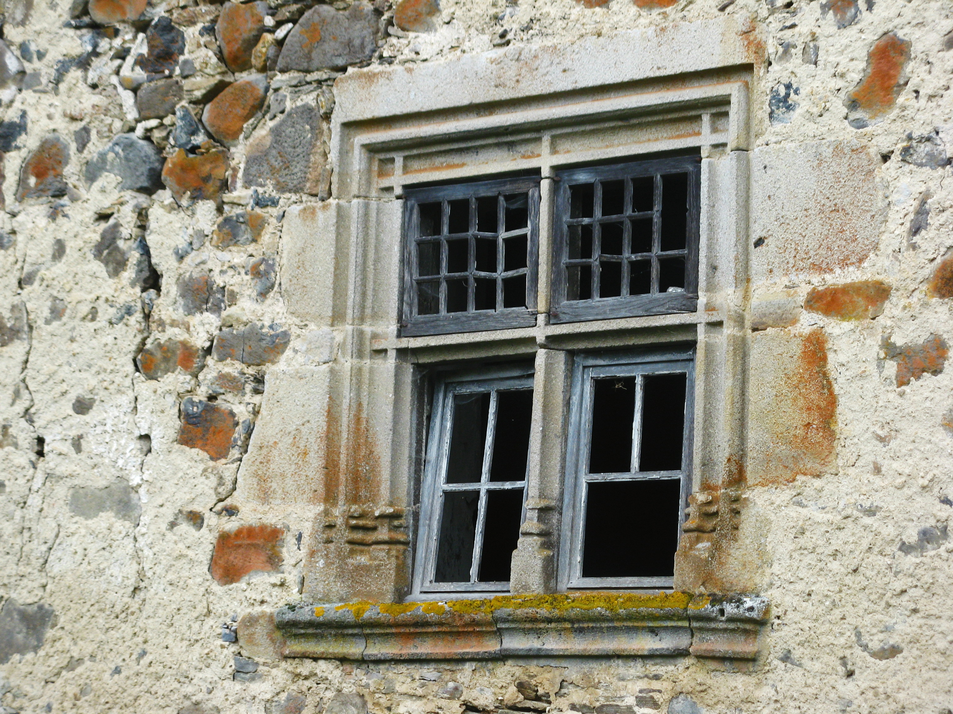 Jaleyrac, fenêtre à meneaux de la maison d'Anjaliac